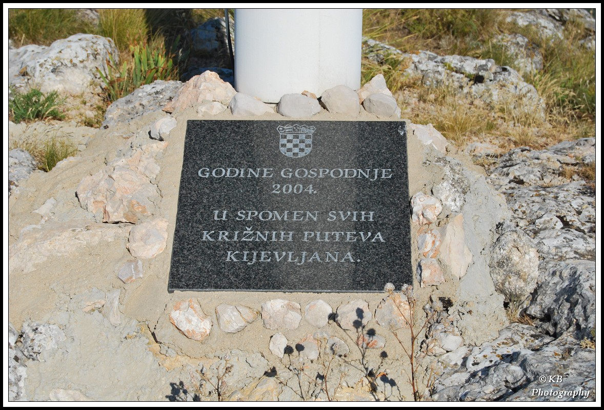 spomen ploča kraj križa u Kijevu